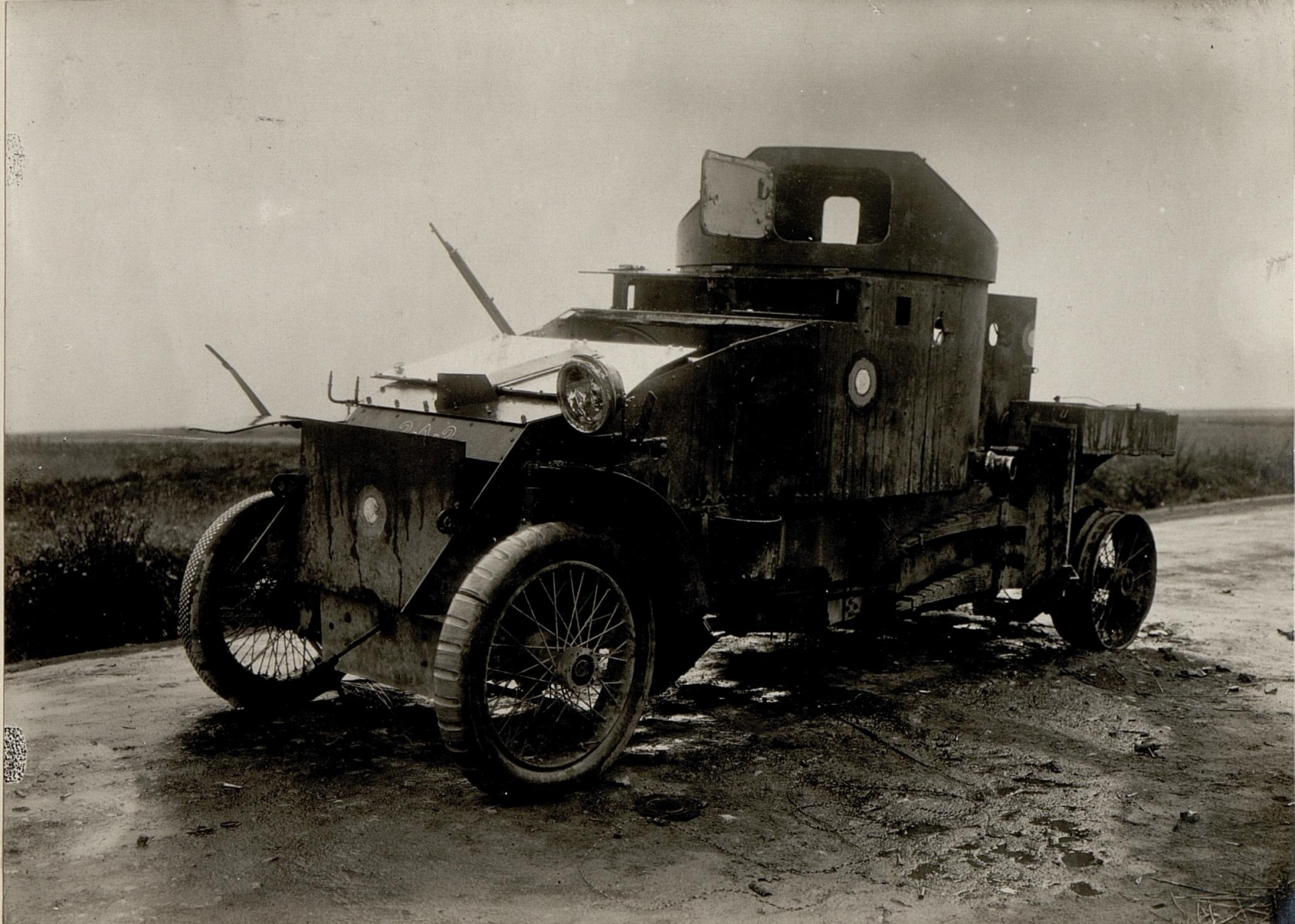 Russische Panzerauto.